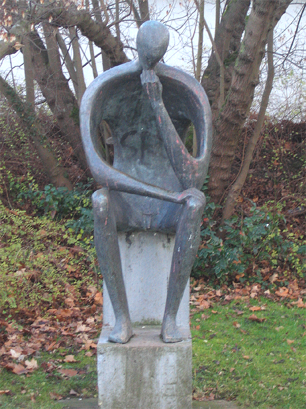 Der Denker by Heinz Detlef Wüpper at Grotefend-Gymnasium Münden, Germany, 2006-12-27